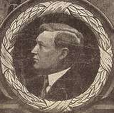 Viktor Dvorčák (maď. Dvorcsák Győző[1]; * 21. apríl 1878, Svidník, Slovensko – † 8. august 1943, Budapešť, Maďarsko[2]) bol prešovský župný archivár, novinár a politik, spolupracovník maďarskej vlády s krycím menom Szőke Költő (Plavovlasý básnik).[3]